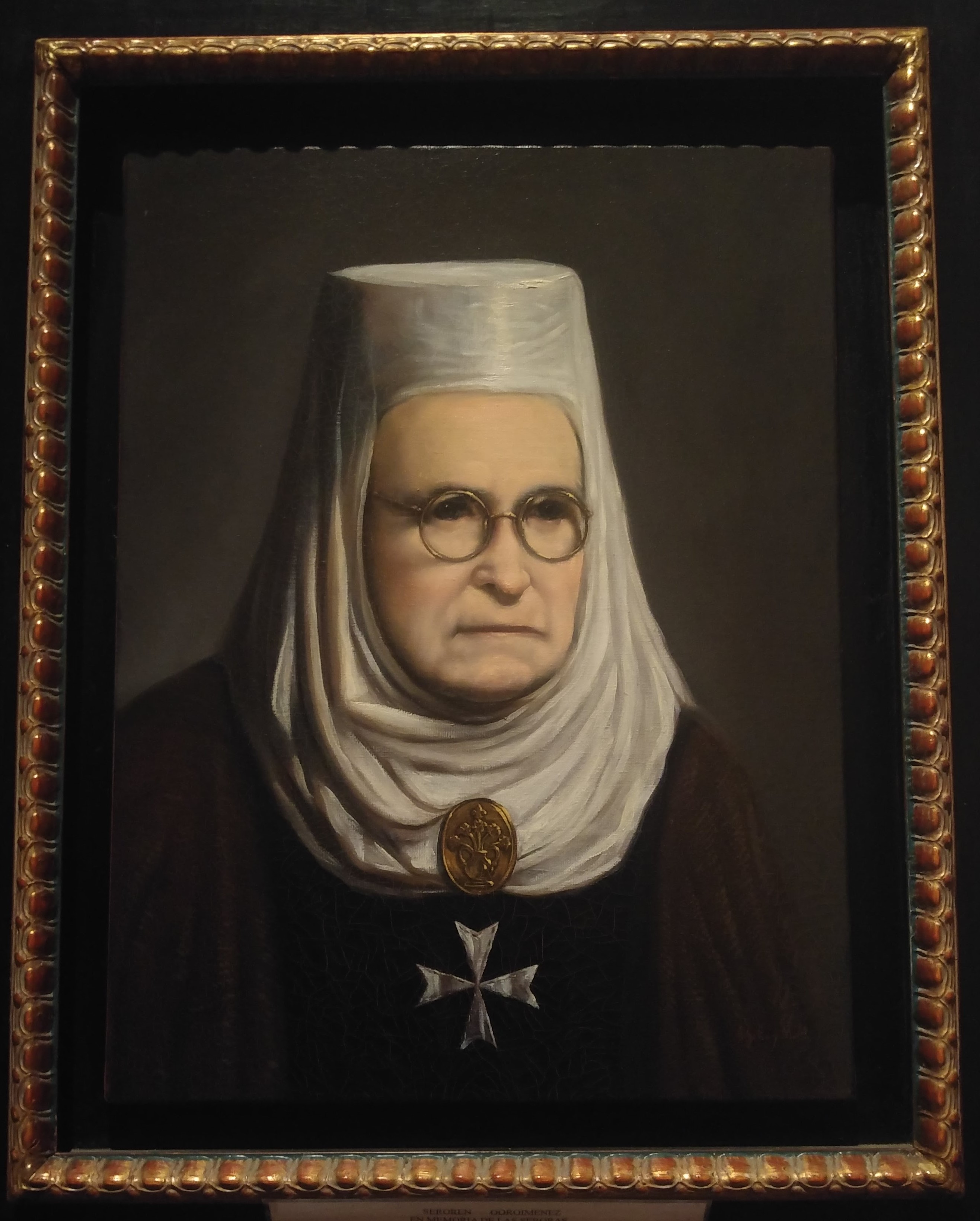 Idiazabalgo Serotegiko azken serora Bargotako ordenako erropekin jantzita.